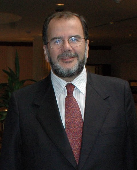 El entonces Ministro de Economía de Chile, Jorge Rodríguez Grossi, durante su visita a la Argentina.